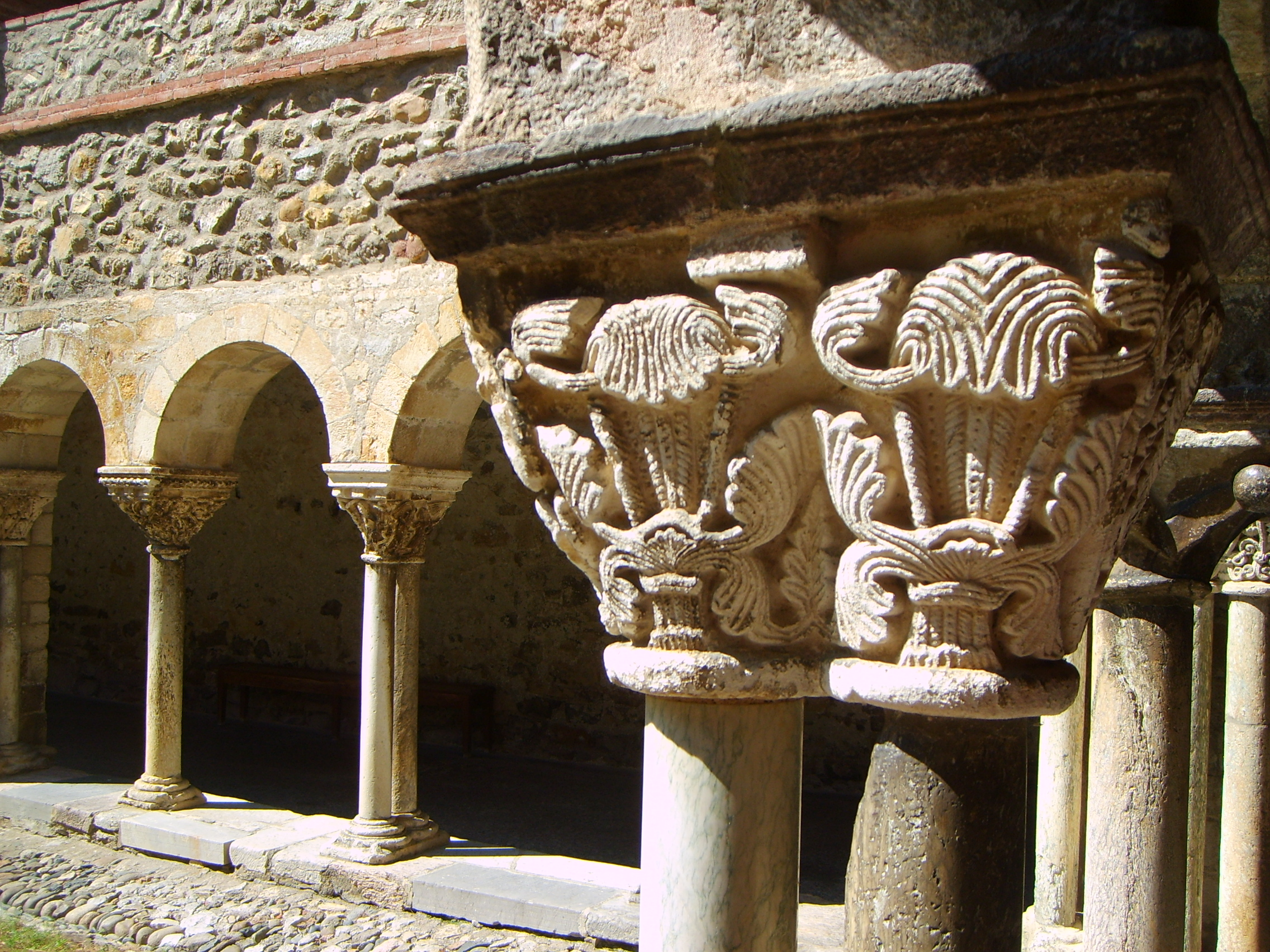 Cloître de la cathédrale de Saint-Lizier (Ariège, France).